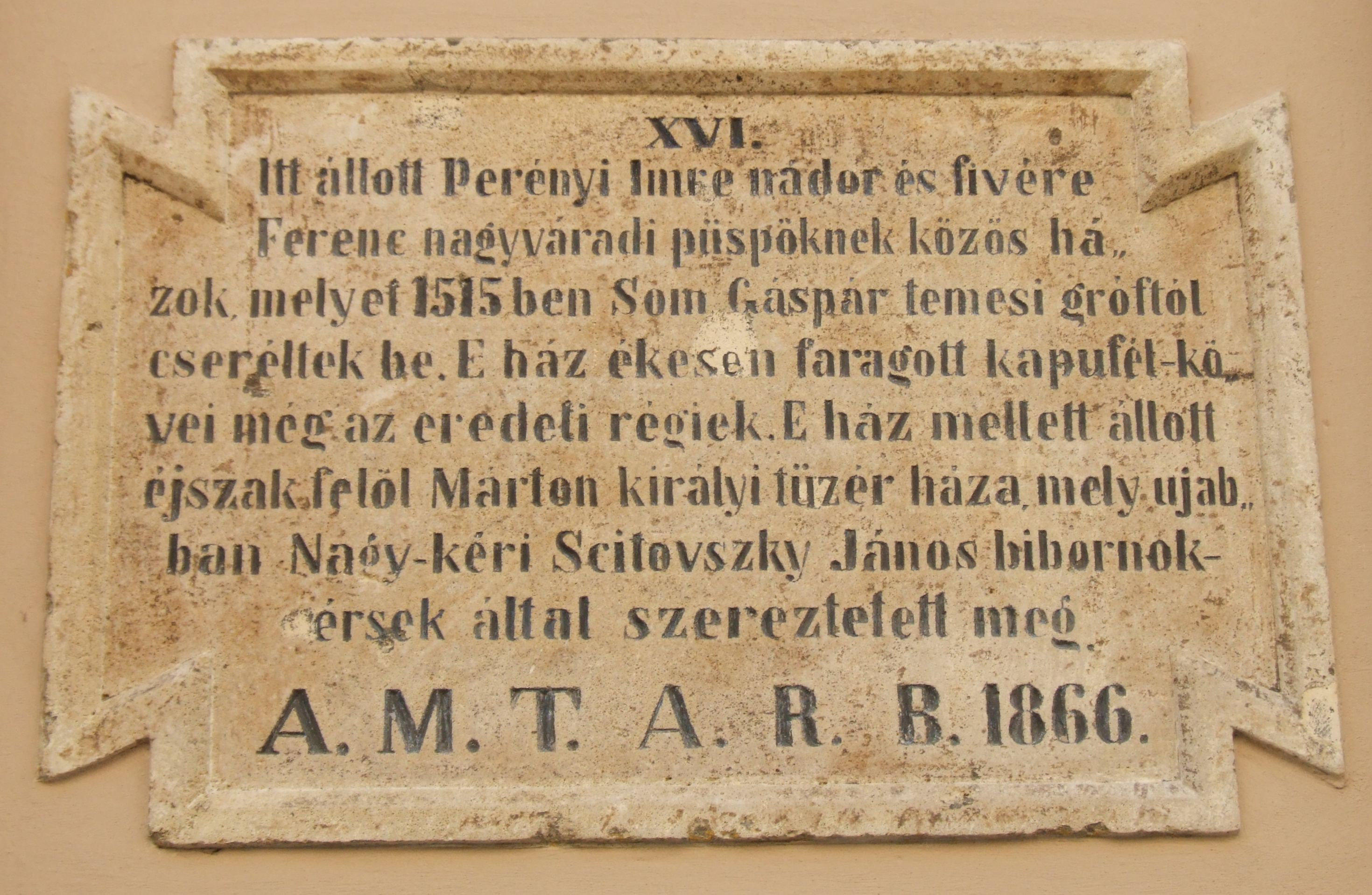 Perényi Imre nádor és Perényi Ferenc püspök emléktáblája. Budapest I. kerület, Úri utca 60. Felirata: „Itt állott Perényi Imre nádor és fivére Ferenc nagyváradi püspöknek közös házok, melyet 1515-ben Som Gáspár temesi gróftól cseréltek be. E ház ékesen faragott kapufél-kövei még az eredeti régiek. E ház mellett állott éjszak felől Márton királyi tüzér háza, mely újabban Nagy-kéri Scitovszky János bíbornok-érsek által szereztetett meg. A. M. T. A. R. B. 1866.” A tábla feliarata bizonyára téves, mert Perényi Ferenc fia Perényi Imere nádornak.